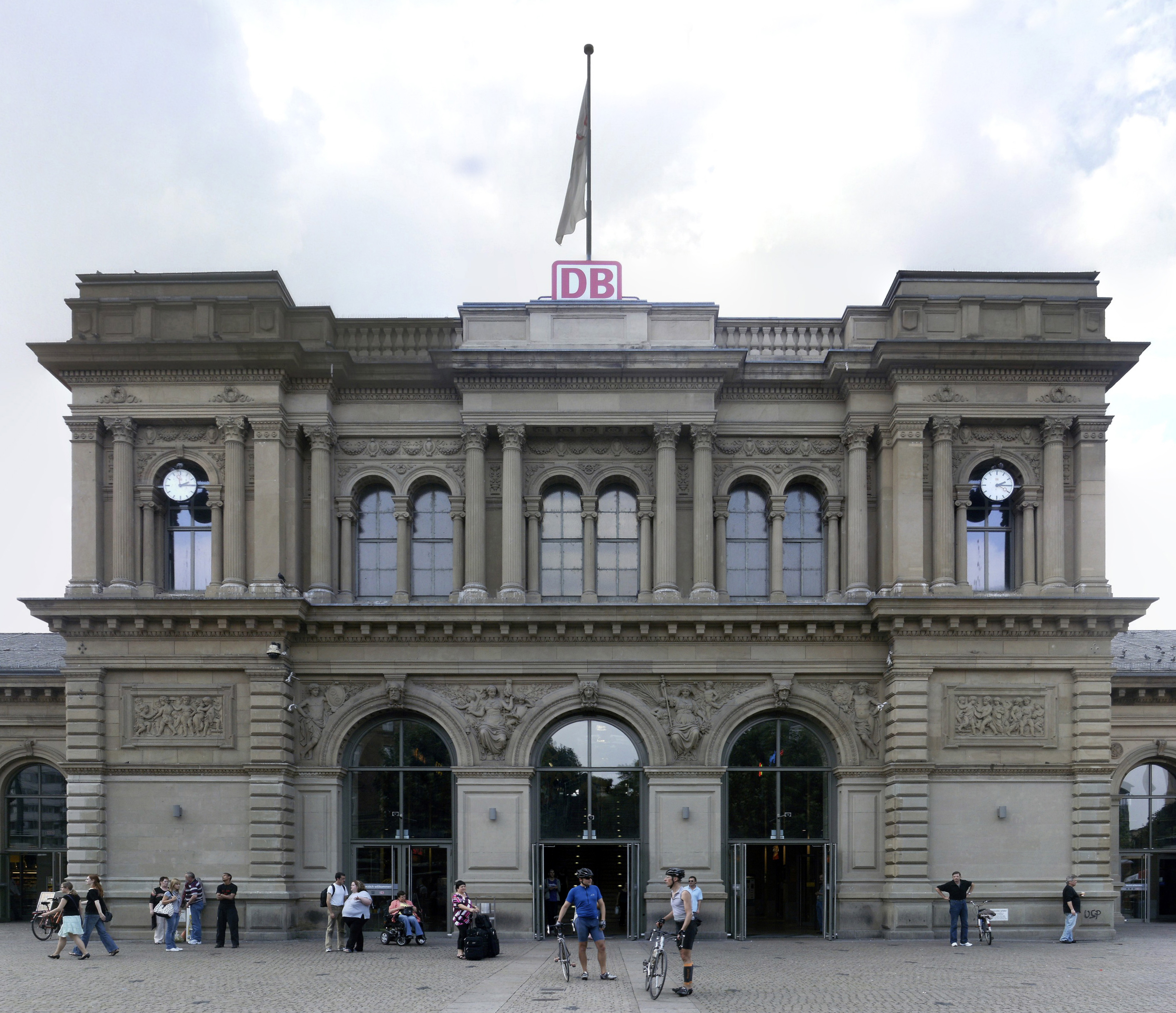 Hauptbahnhof Mainz, Germany. Stiched out of 16 pictures.